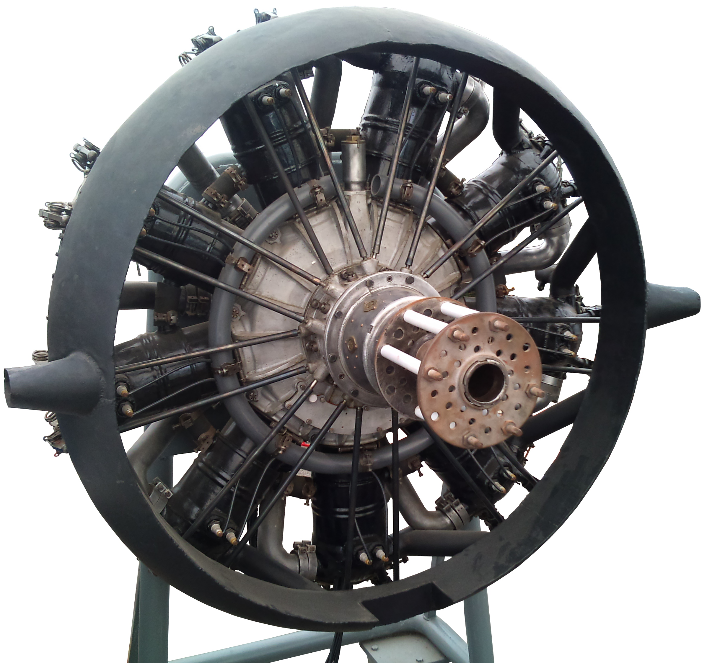 Moteur Salmson Z-9 exposé aux Ailes Anciennes Toulouse.